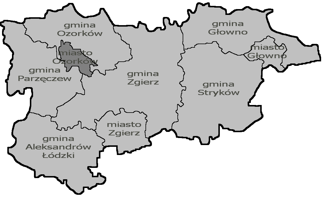 Gmina miejska Ozorków na mapie powiatu zgierskiego